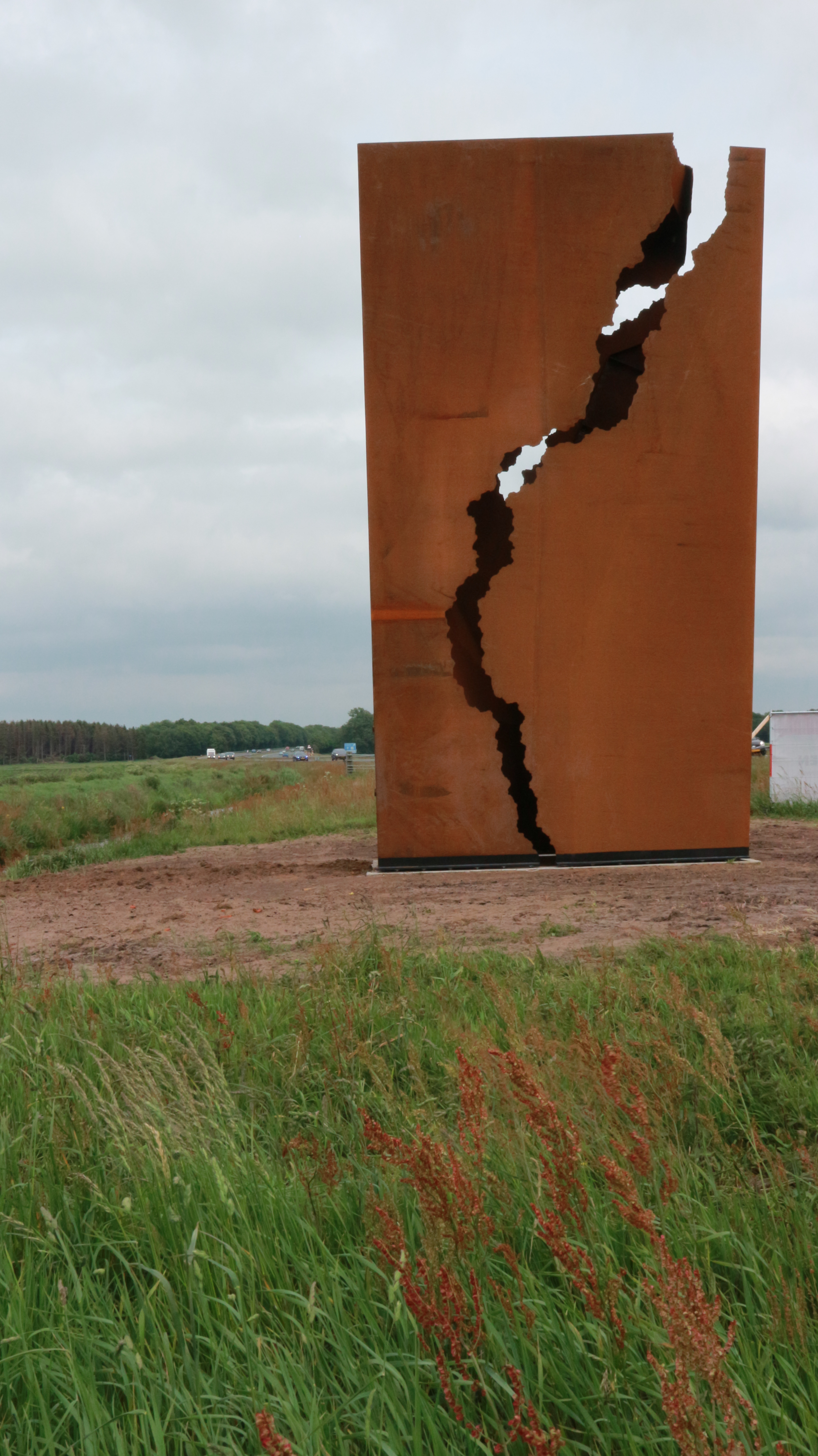 Het Andere Monument, acht meter hoge beeltenis van de negatieve gevolgen van de Gaswinning in Groningen. Het monument vraagt aandacht voor degene die daar de dupe van zijn en voor degene die er vergeefs voor hebben gewaarschuwd. De belangrijkste onder de laatstgenoemde groep is dr. Meent van der Sluis. De onthulling was op 28 mei 2019 door Jeroen Dijsselbloem, voorzitter van de Onderzoeksraad voor Veiligheid, in bijzijn van de weduwe van Meent van der Sluis, Mevr. Trijni van der Sluis. Het monument is gemaakt door Karel Buskes.